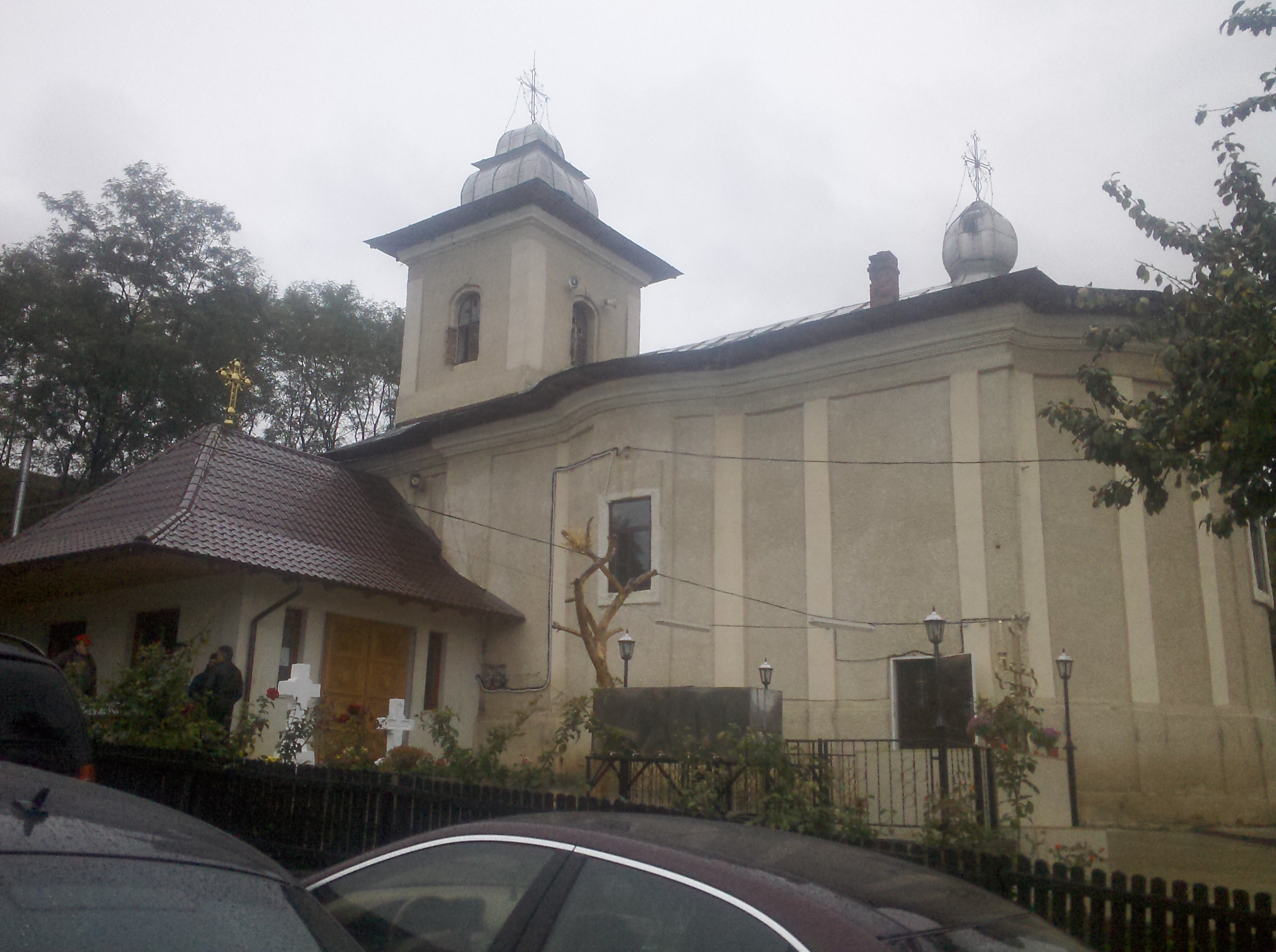 Monasteri de Giurgeni